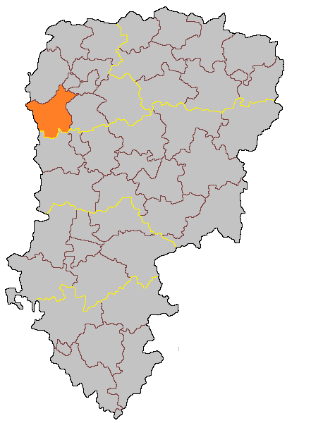 Кантон Сен-Симон на карте департамента Эна